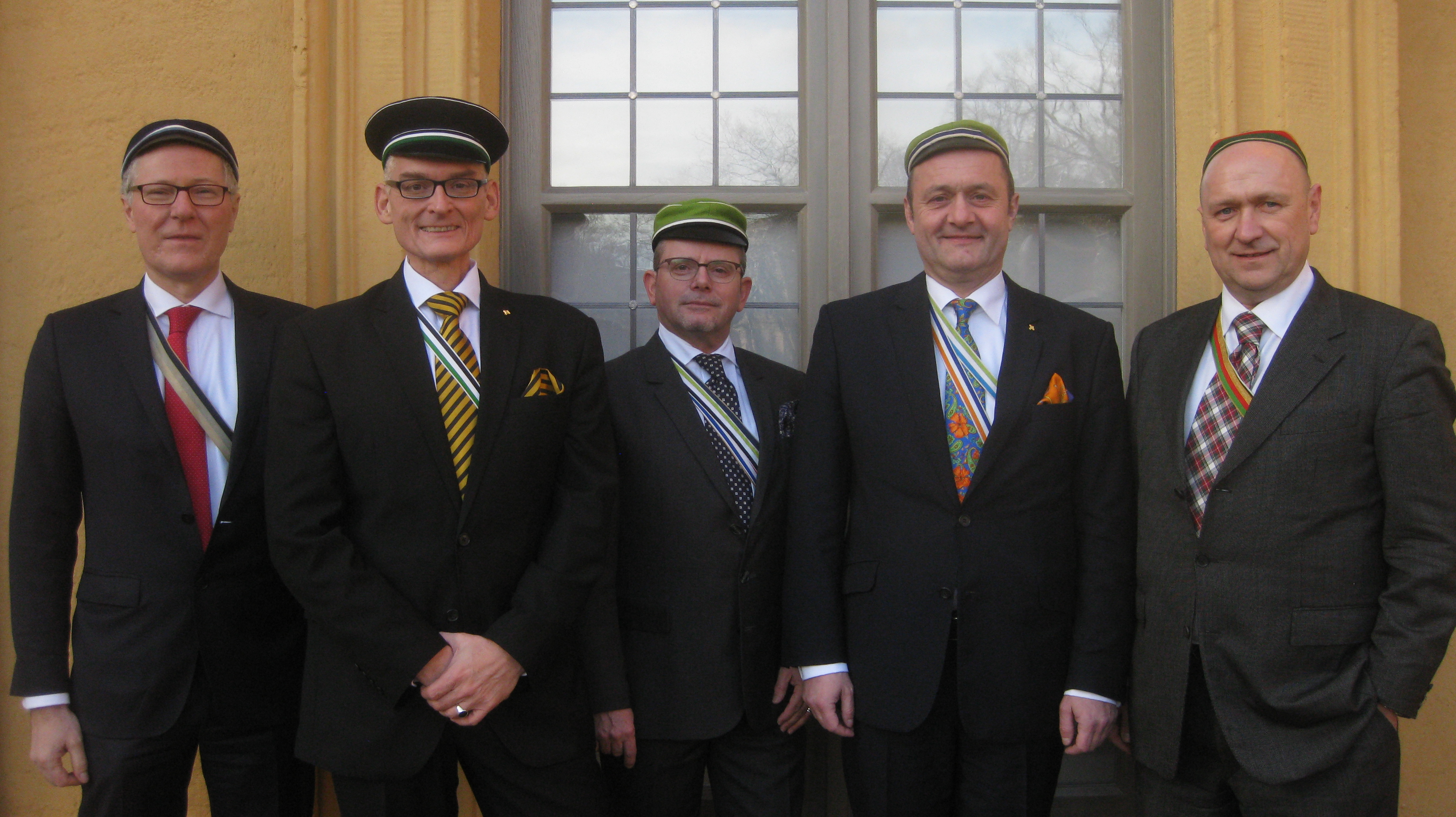 Der VAC-Vorstand Nürnberg II ist seit dem 1. Januar 2016 im Amt.